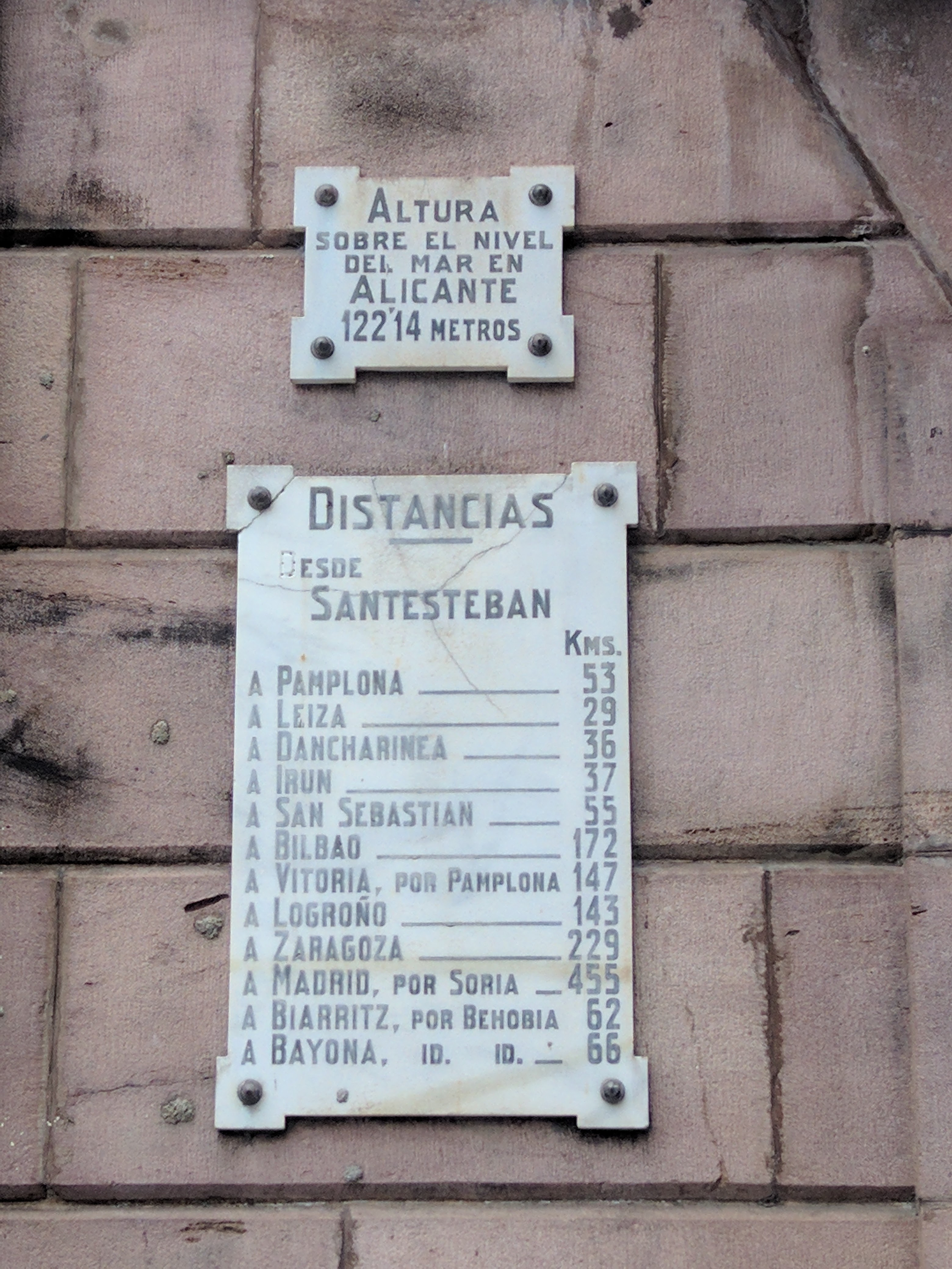 Doneztebe multzo historikoa